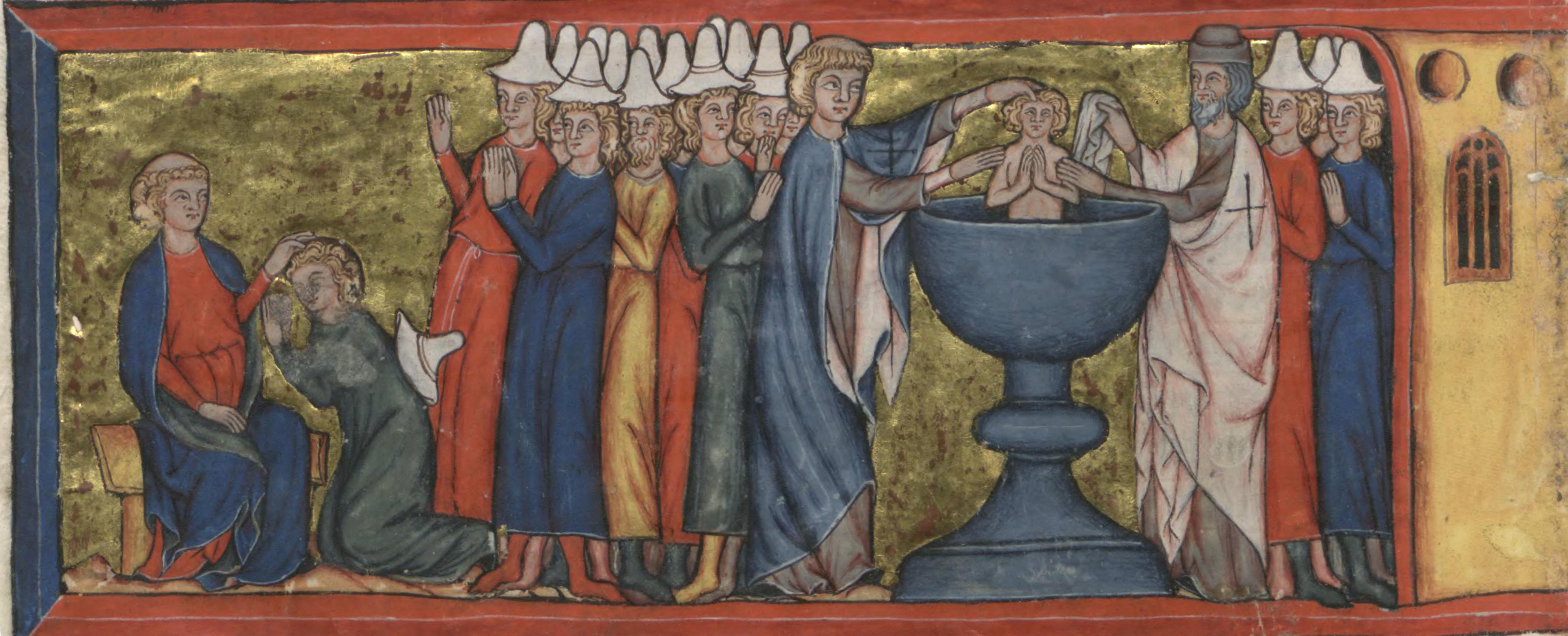 "Крещение евреев" миниатюра из книги Генриха Хеслера "Апокалипсис". У священников на плече черный крест - символ Тевтонского ордена